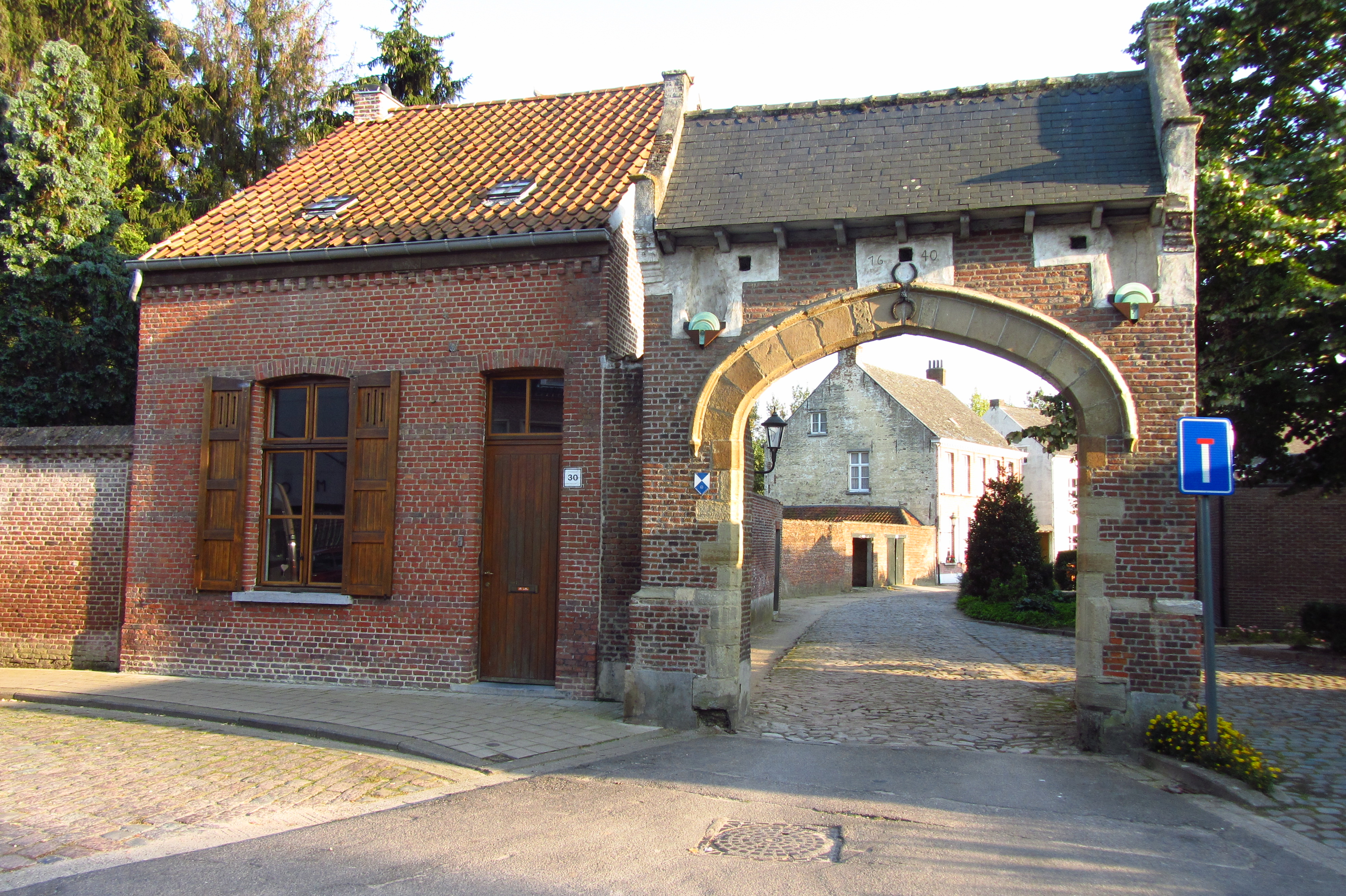 Begijnhof van Herentals - vooraanzicht van open poort met bijgebouw